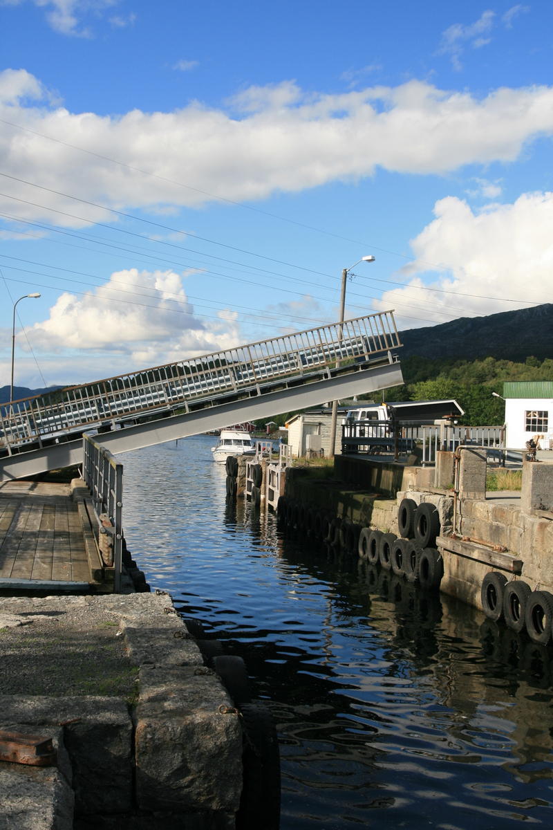 Skjoldastraumen sluser, bridge